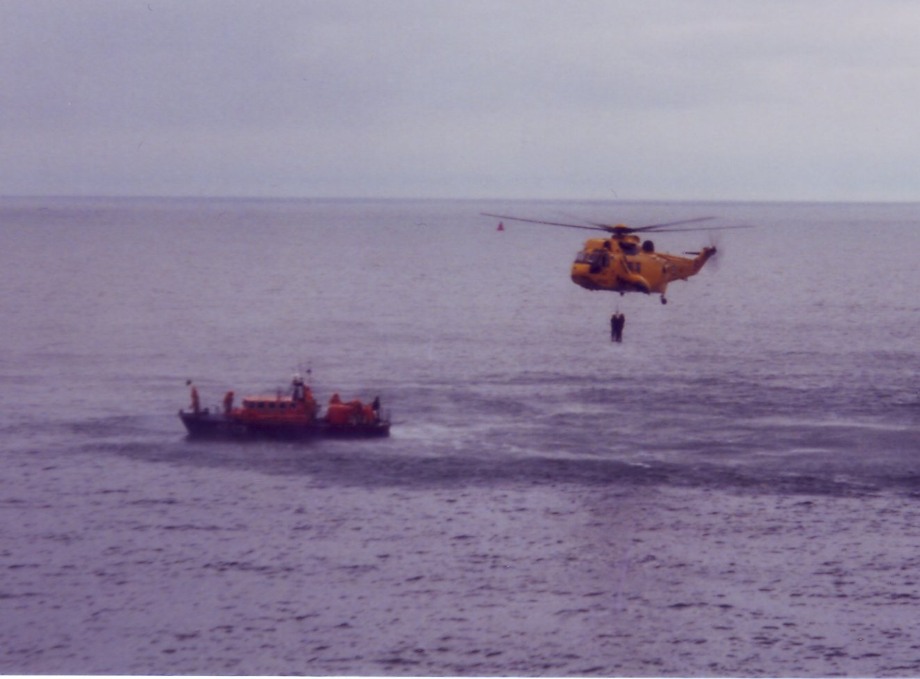 Einsatz eines SAR Westland Sea King der Royal Air Force in der Bucht von Swansea (Wales)